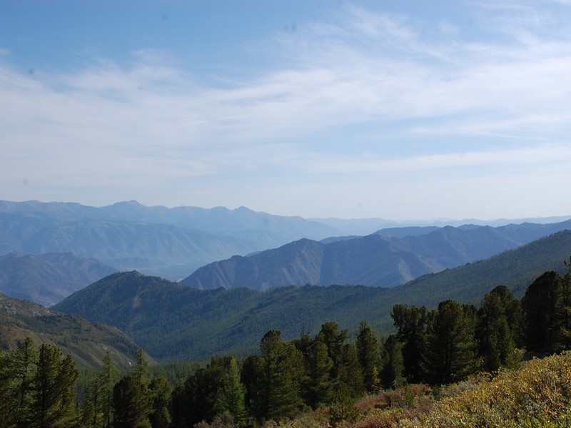 Среднегорье Алтая.